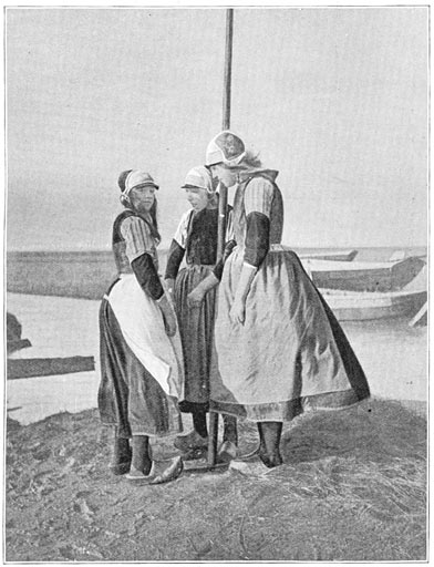 Meisjes en mutsjes van Volendam. N.B. Dit lijken eerder de kostuums van Marken.